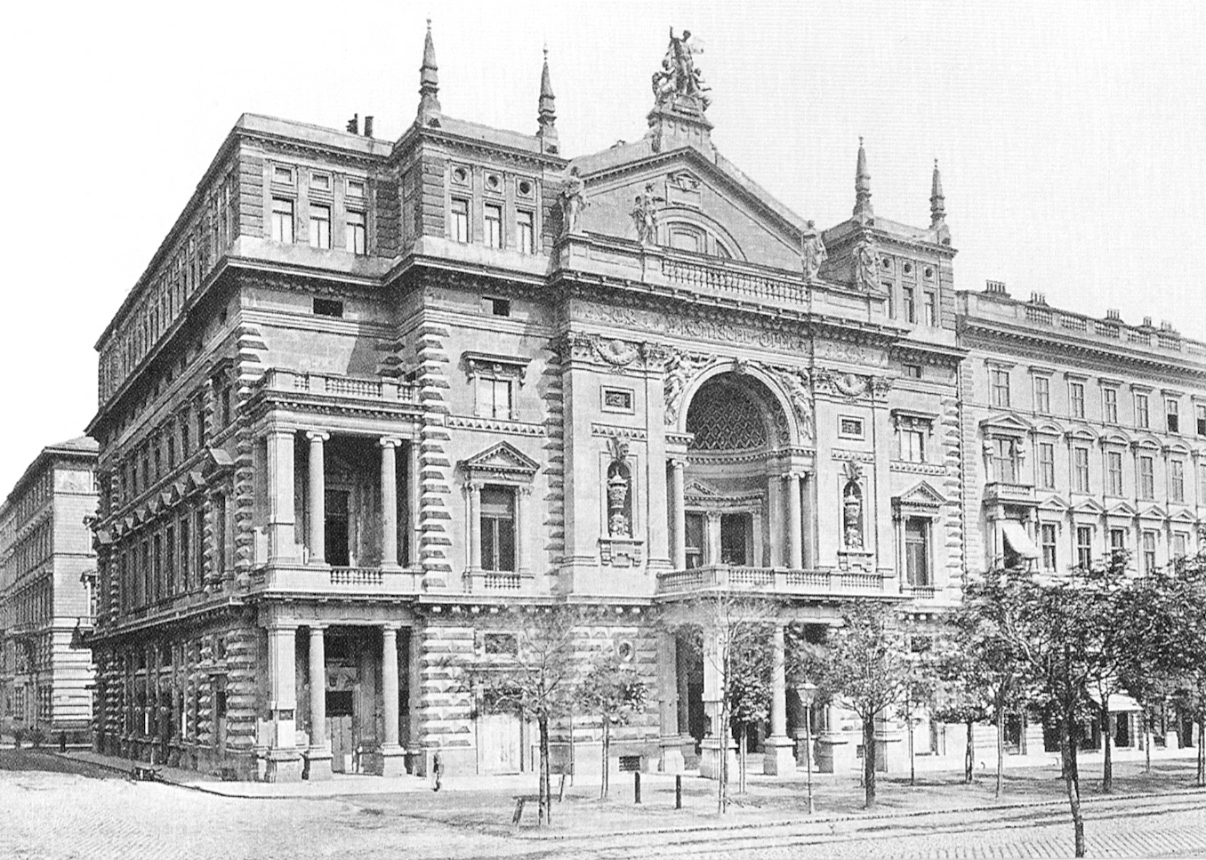 Das 1881 abgebrannte Ringtheater am Schottenring 7 in Wien, Innere-Stadt.